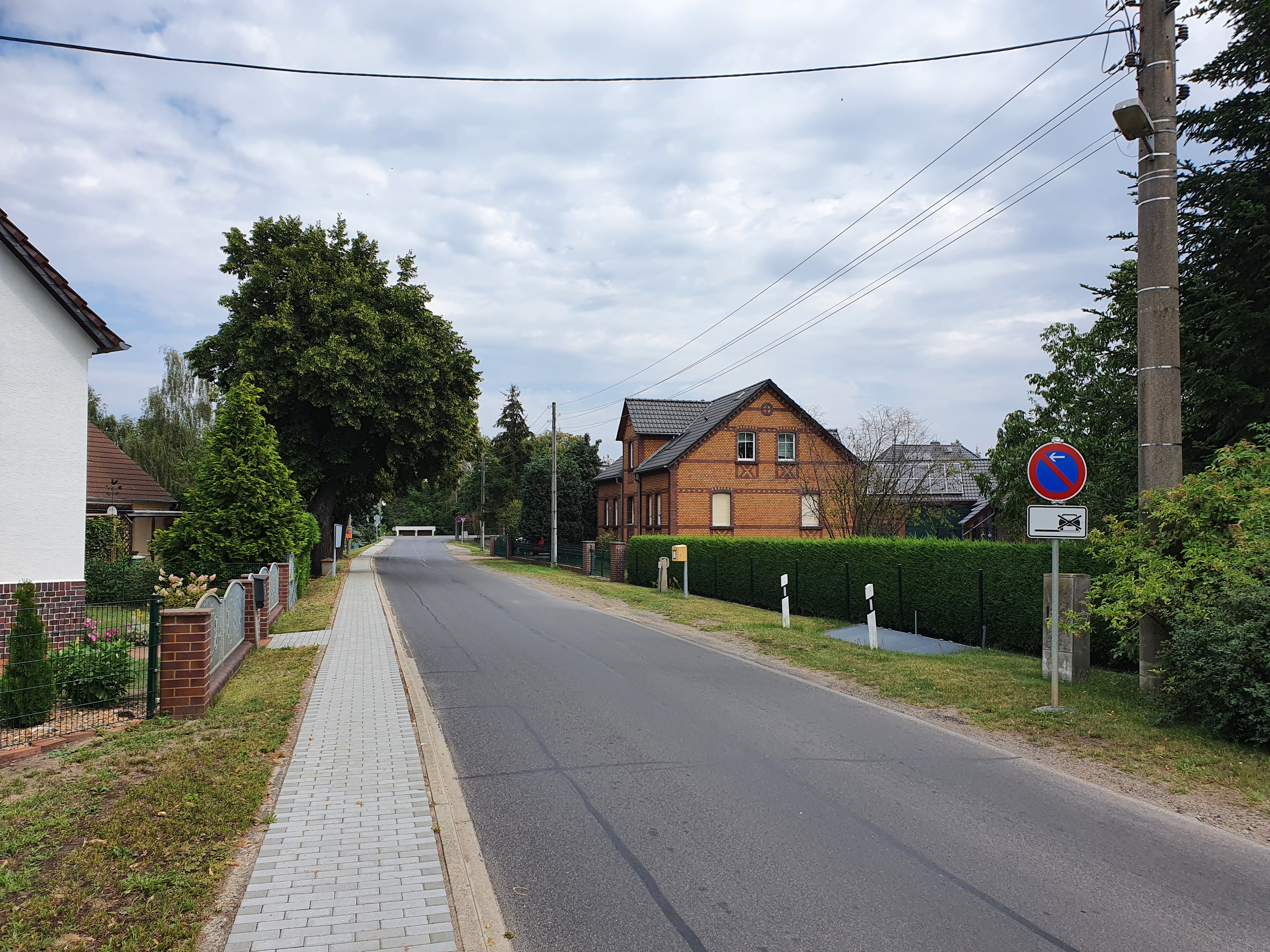 Die Göritzer Dorfstraße in Göritz, einem Ortsteil der Stadt Vetschau im Landkreis Oberspreewald-Lausitz in Brandenburg, hinter der Autobahnunterführung nach Norden.